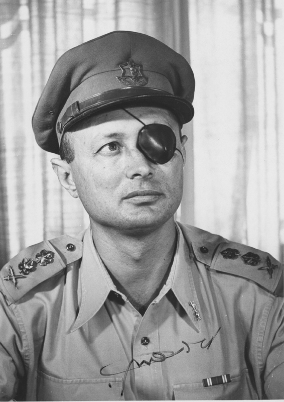 הרמטכ"ל רא"ל משה דיין.